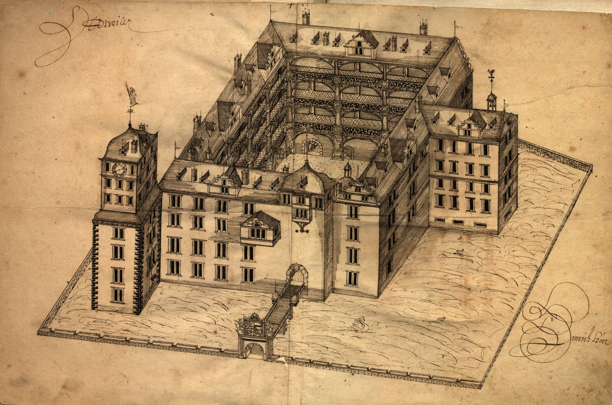 Abbildung des Schlosses Ottweiler; Vierflügelanlage mit Eckturm und Schlosskirche, Ansicht in leichter Vogelschau